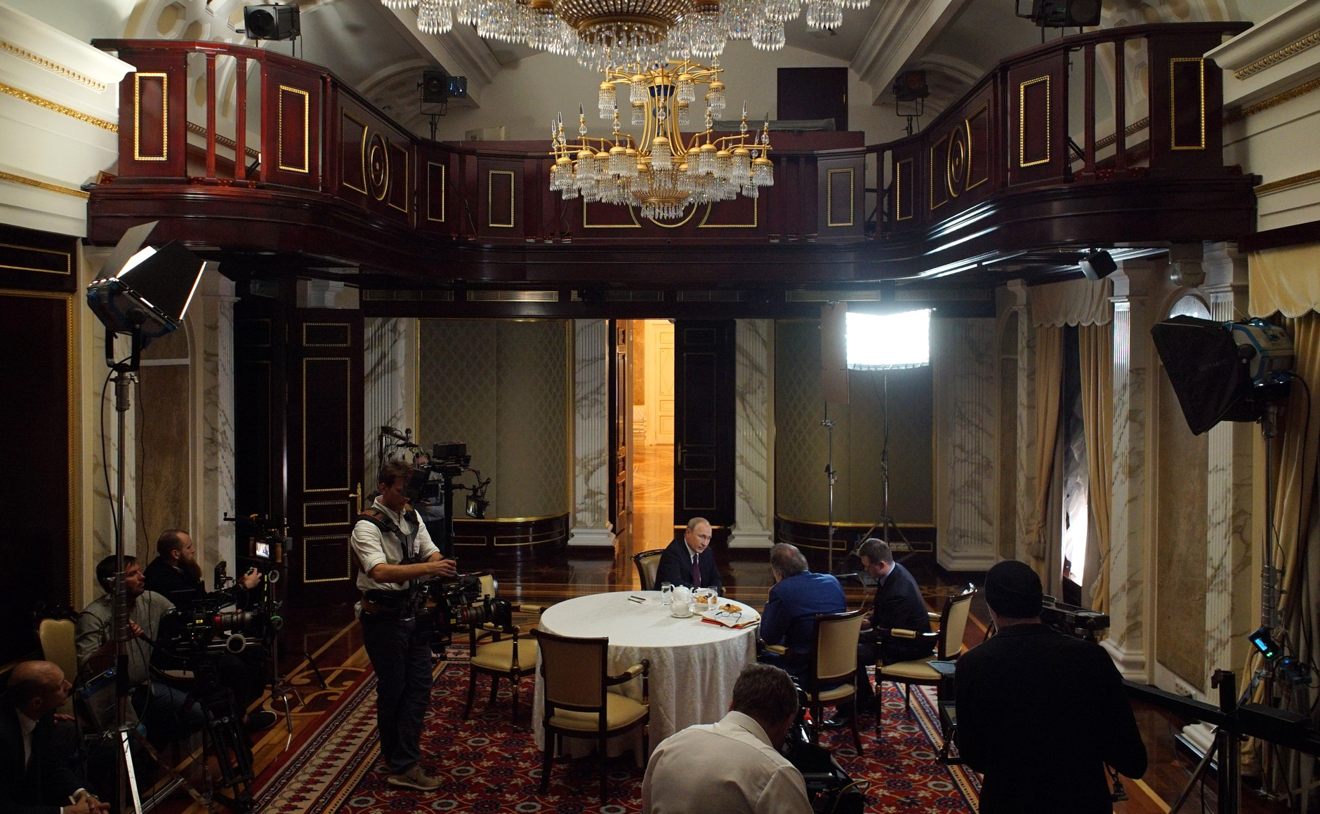 Интервью кинорежиссёру Оливеру Стоуну. Москва, Кремль.